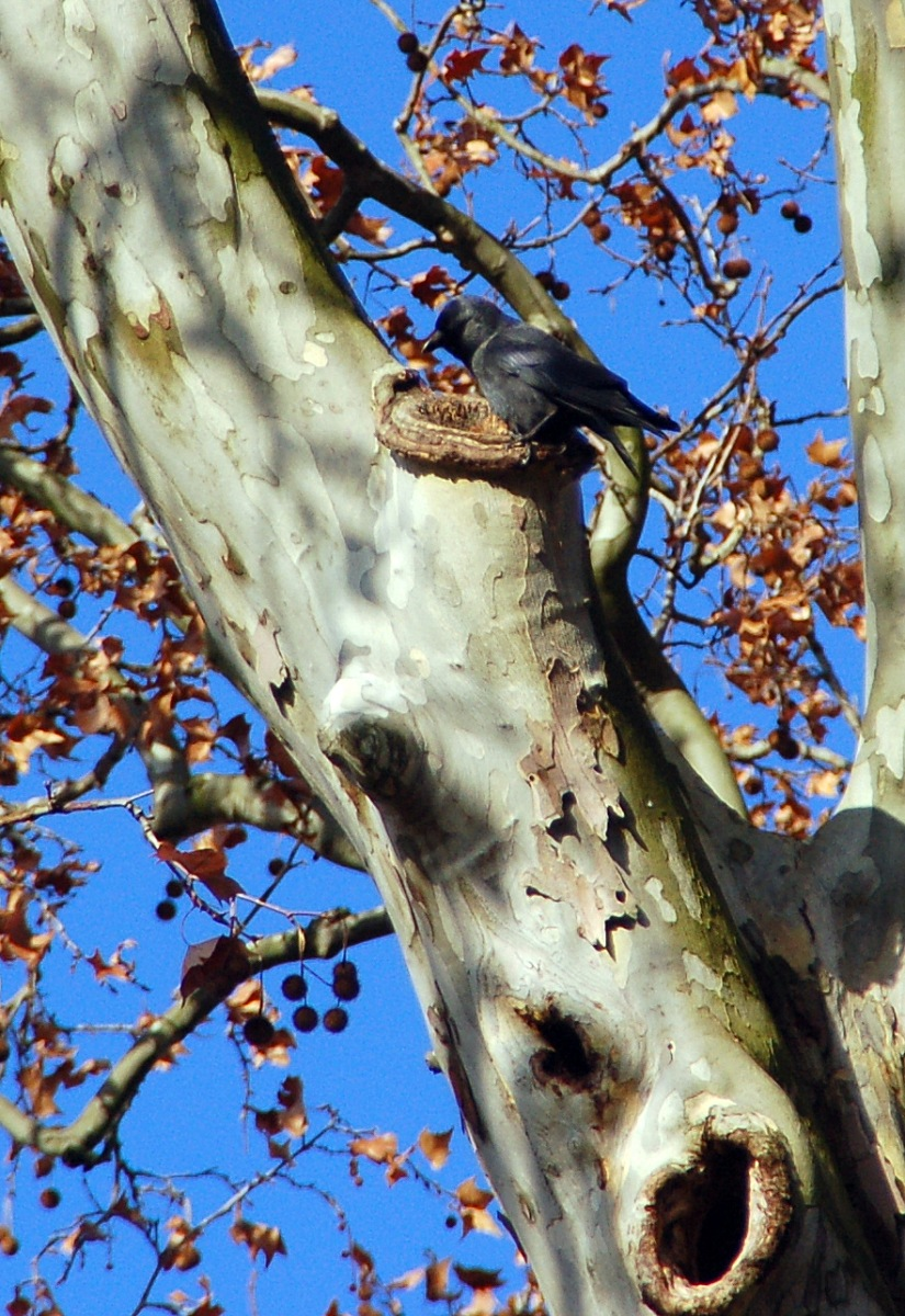 Dohle-Amazone Corvus monedula, Schloßpark Biebrich, Wiesbaden, Hessen, Deutschland